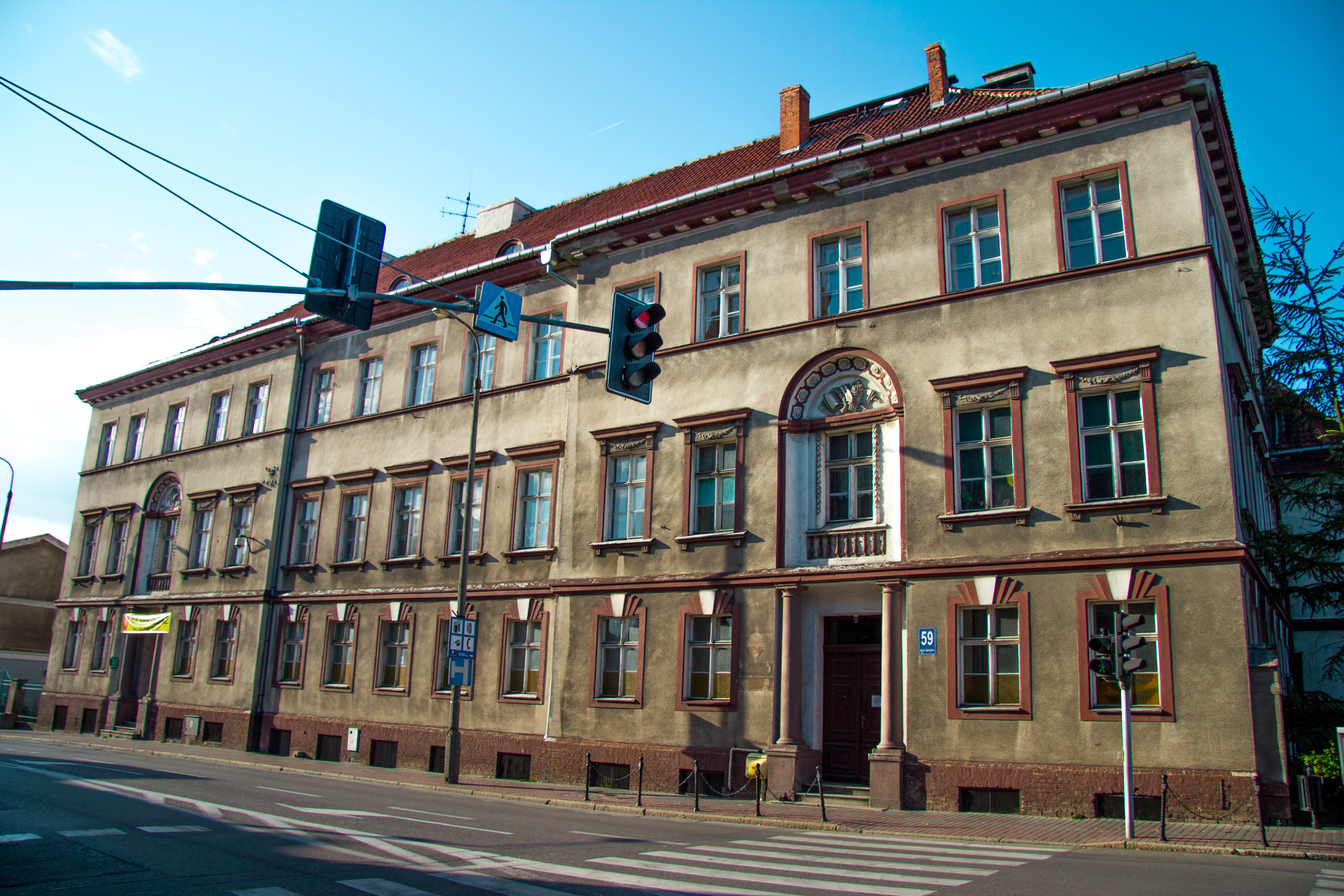 Kwidzyn, ul. Braterstwa Narodów 59 - Wyższy Sąd Ziemski, Szkoła Specjalna w Kwidzynie.